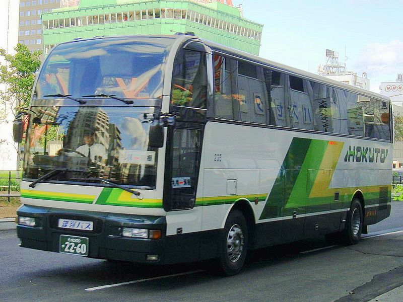 "Tokkyū Setana gō" Sapporo to Setana